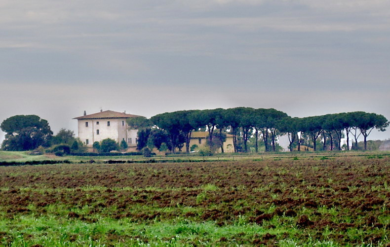 La Torre della Trappola presso Principina a Mare (GR) vista dall'entroterra